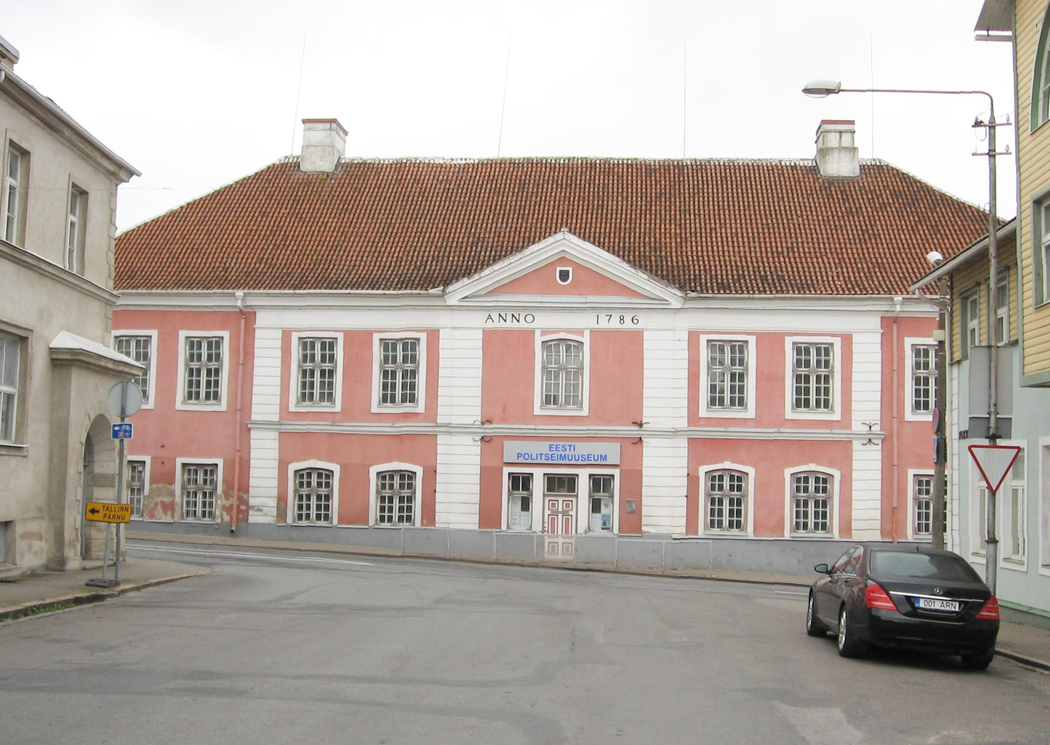 Rakvere kohtuhoone